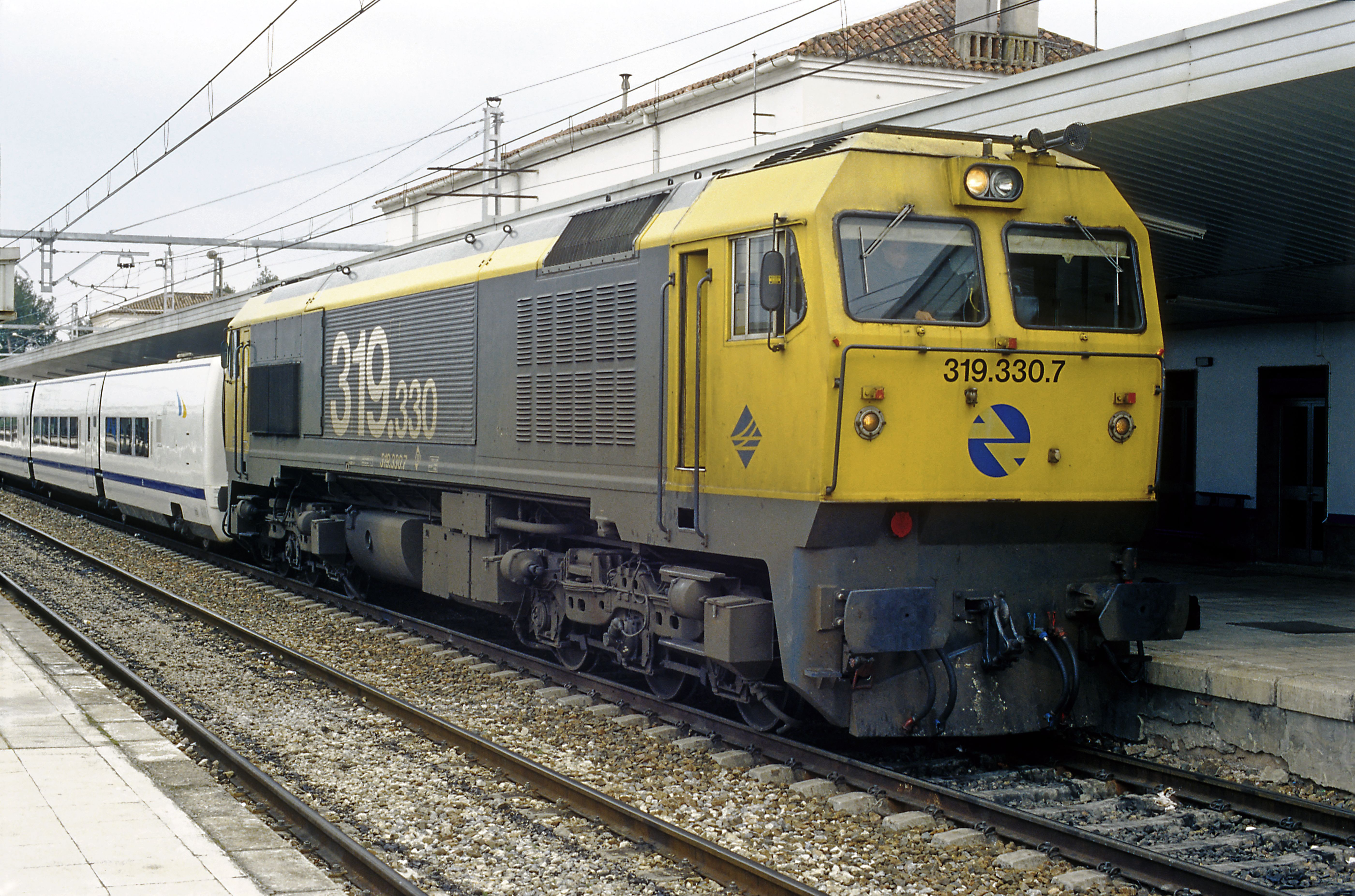 mit Talgo 7 von Almería eingefahren, vor dem Umspannen. Von allen Unterbauarten der 319 sind nur die 319.3 für den Reisezugdienst mit Heizanschlüssen ausgerüstet. See also: Talgo.